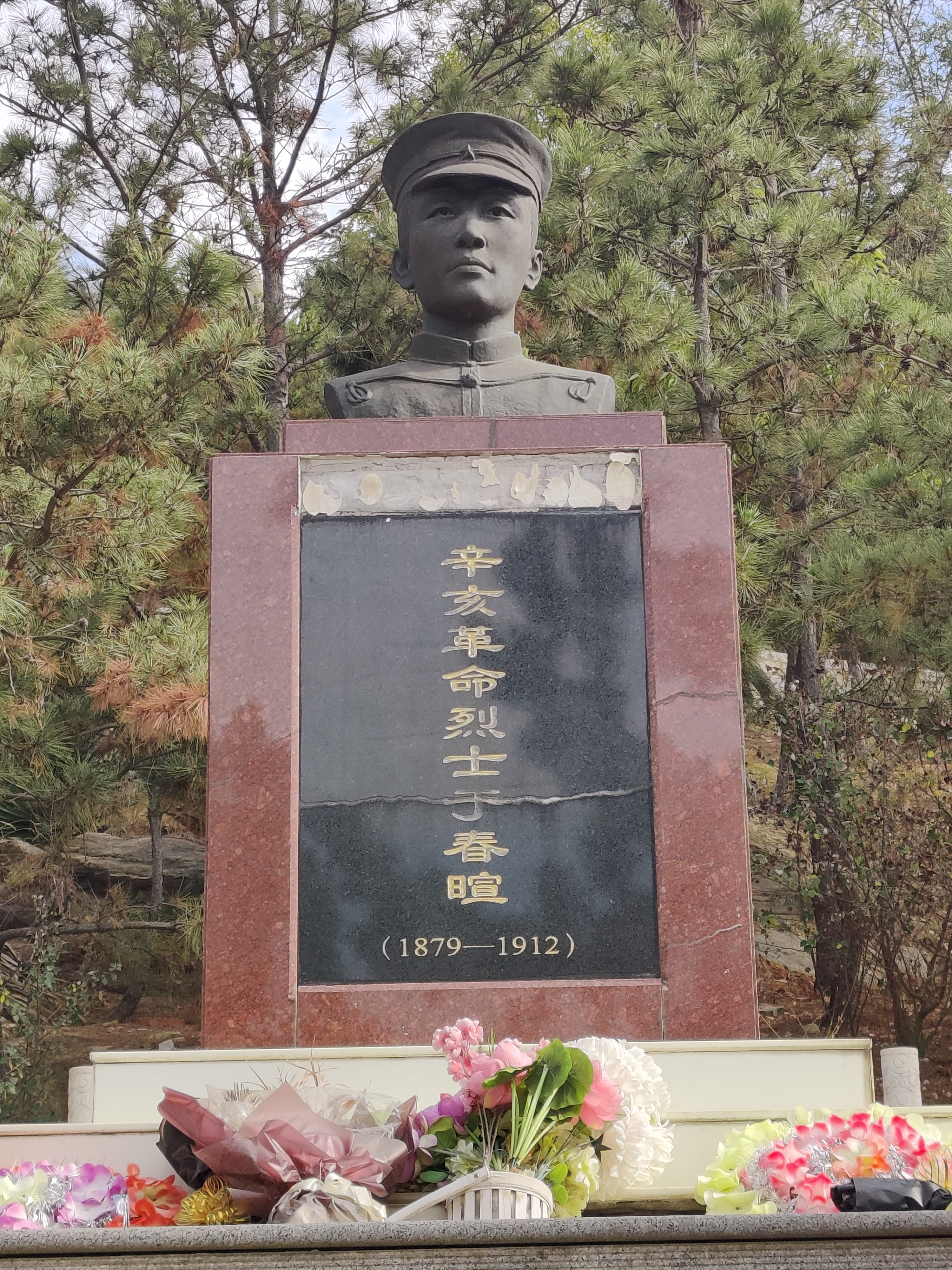 中文（中国大陆）: 于镛，字春暄。同盟会第一批成员，辛亥革命在胶东代表人物之一。